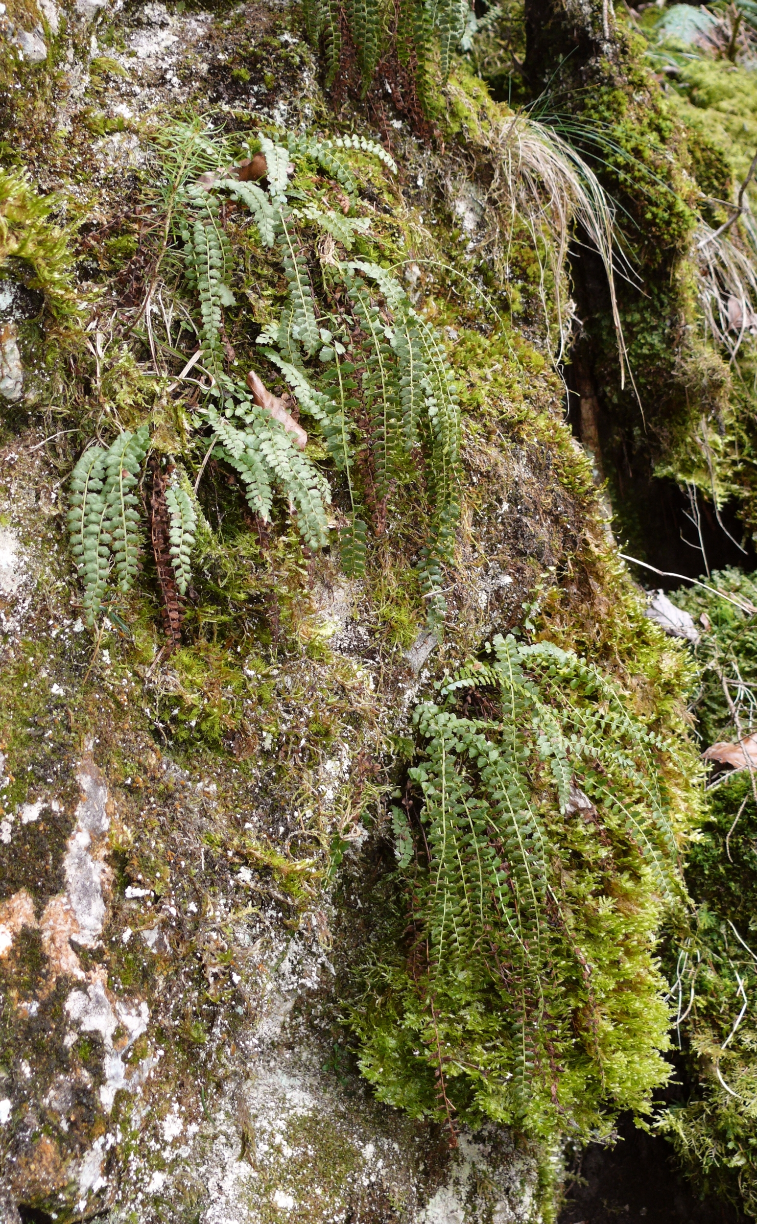 Asplenium viride, Schwäbische Alb, Germany